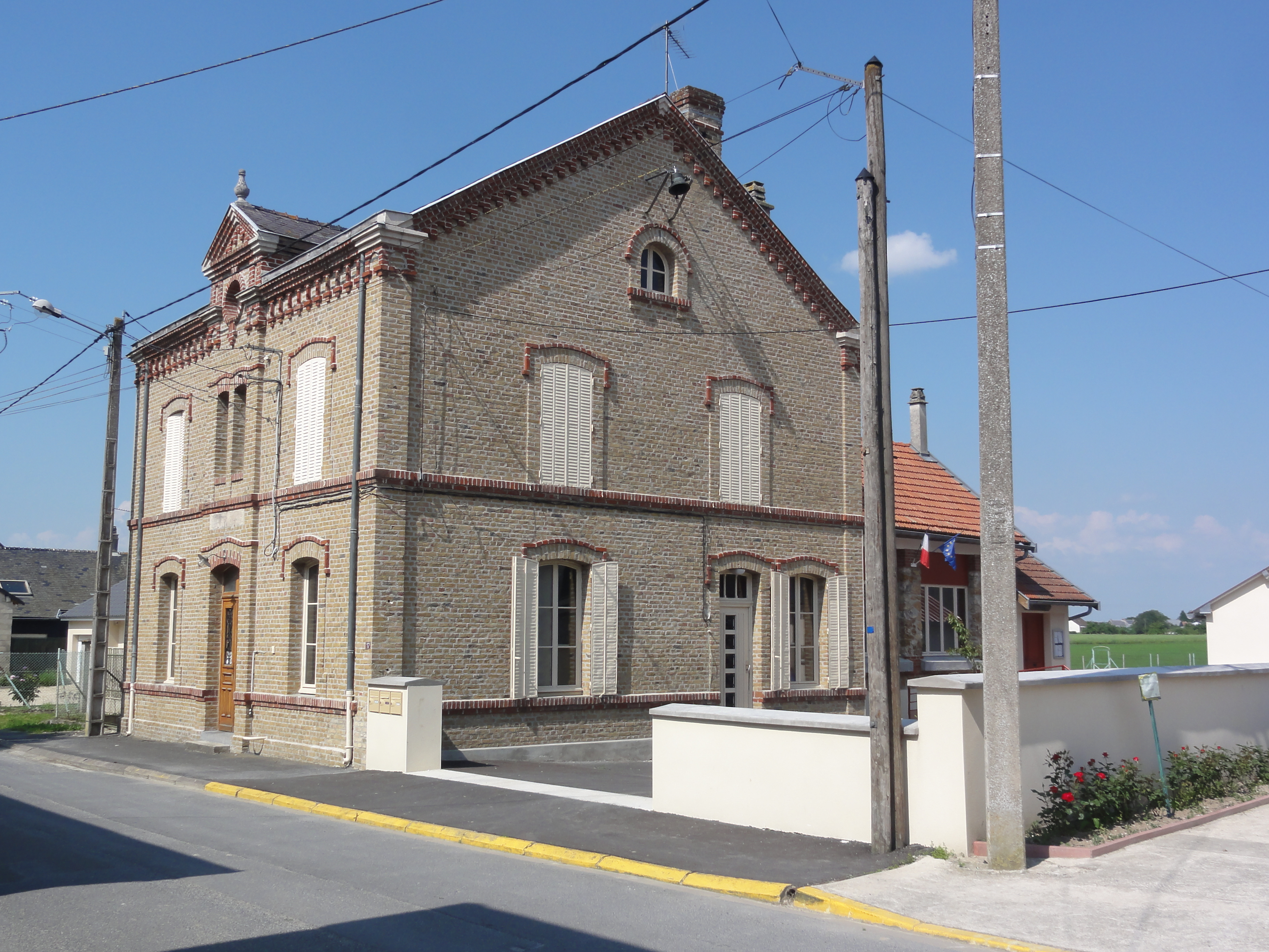 Aire (Ardennes) Mairie